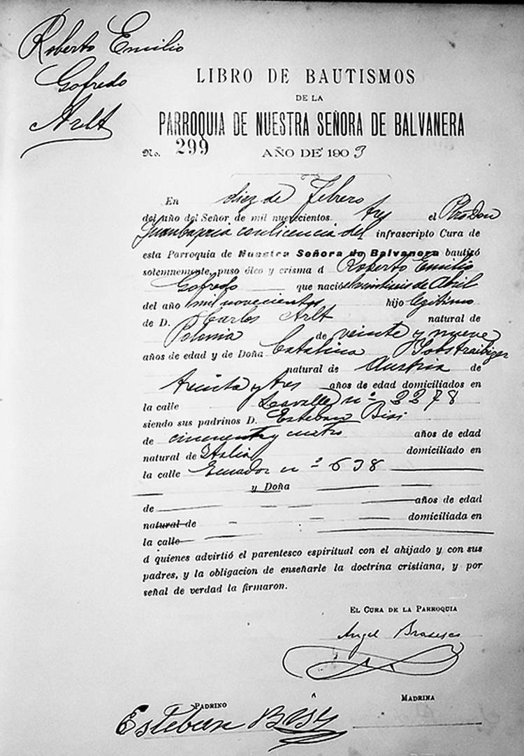 El nombre secreto de Roberto Arlt: hallaron su partida de bautismo.